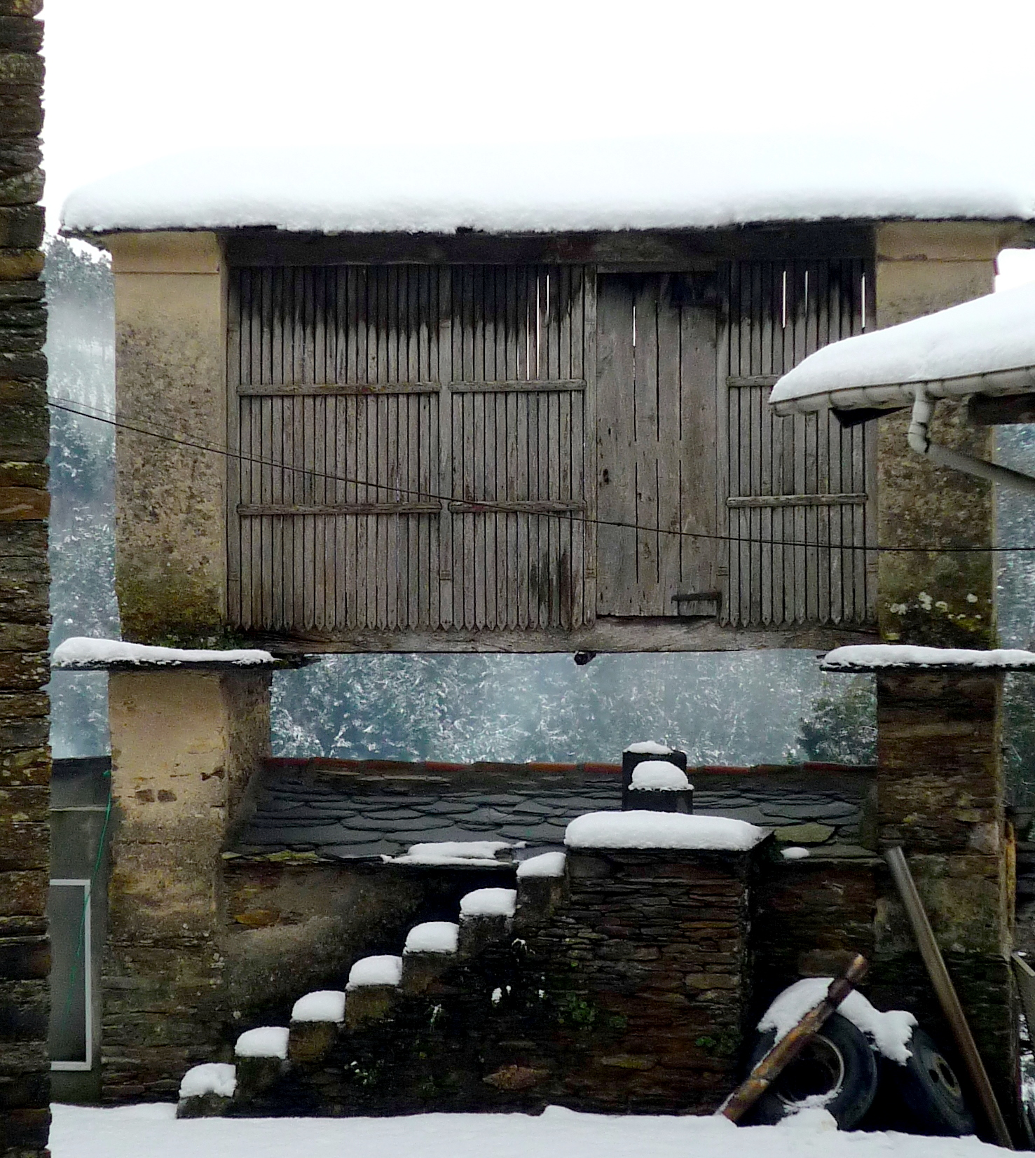 Hórreo, O Vilar de Santiago, Santiago de Mondoñedo, Mondoñedo.jpg